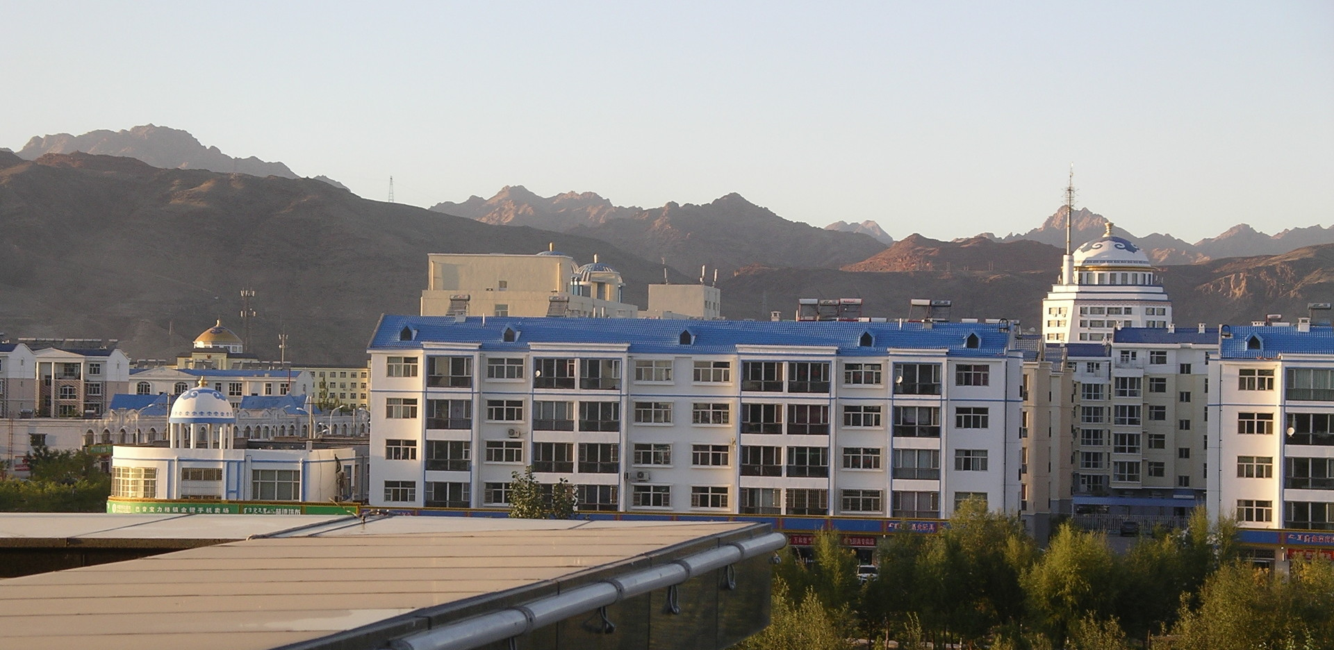 Bayan Bolig Hauptort im Hinteren Urad-Banner in der Inneren Mongolei